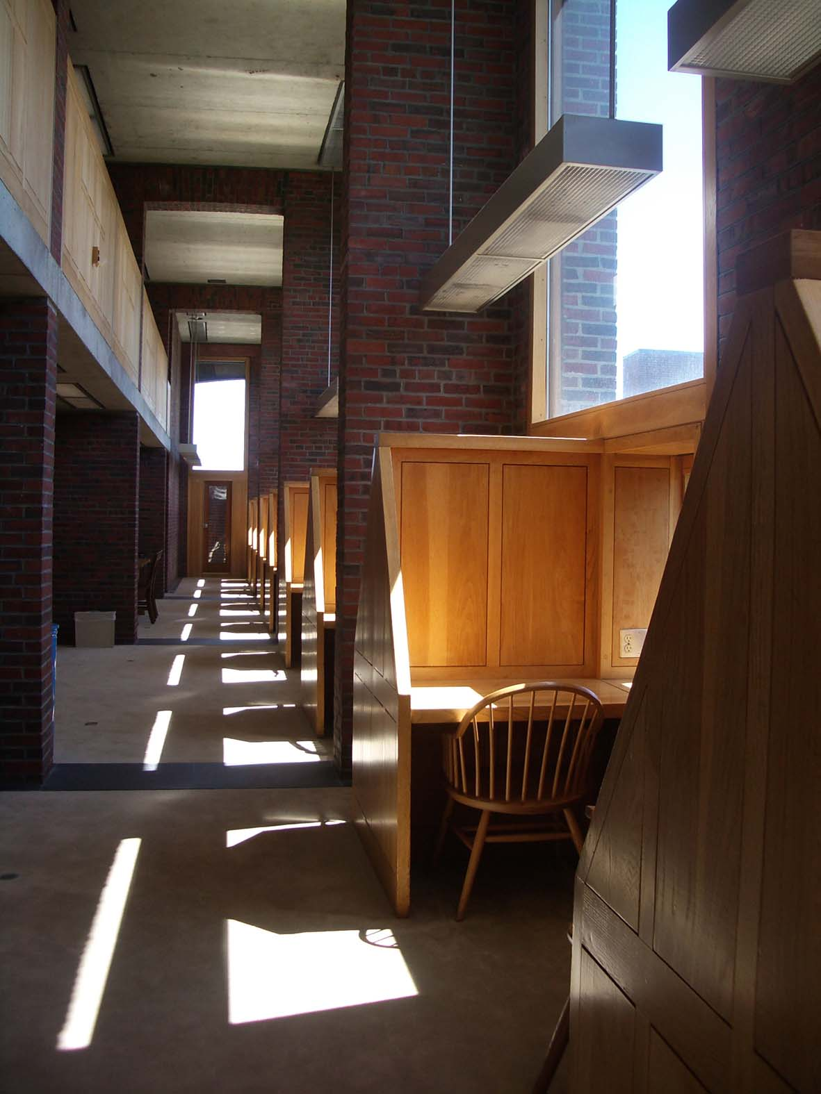 Phillips Exeter Academy library carrels